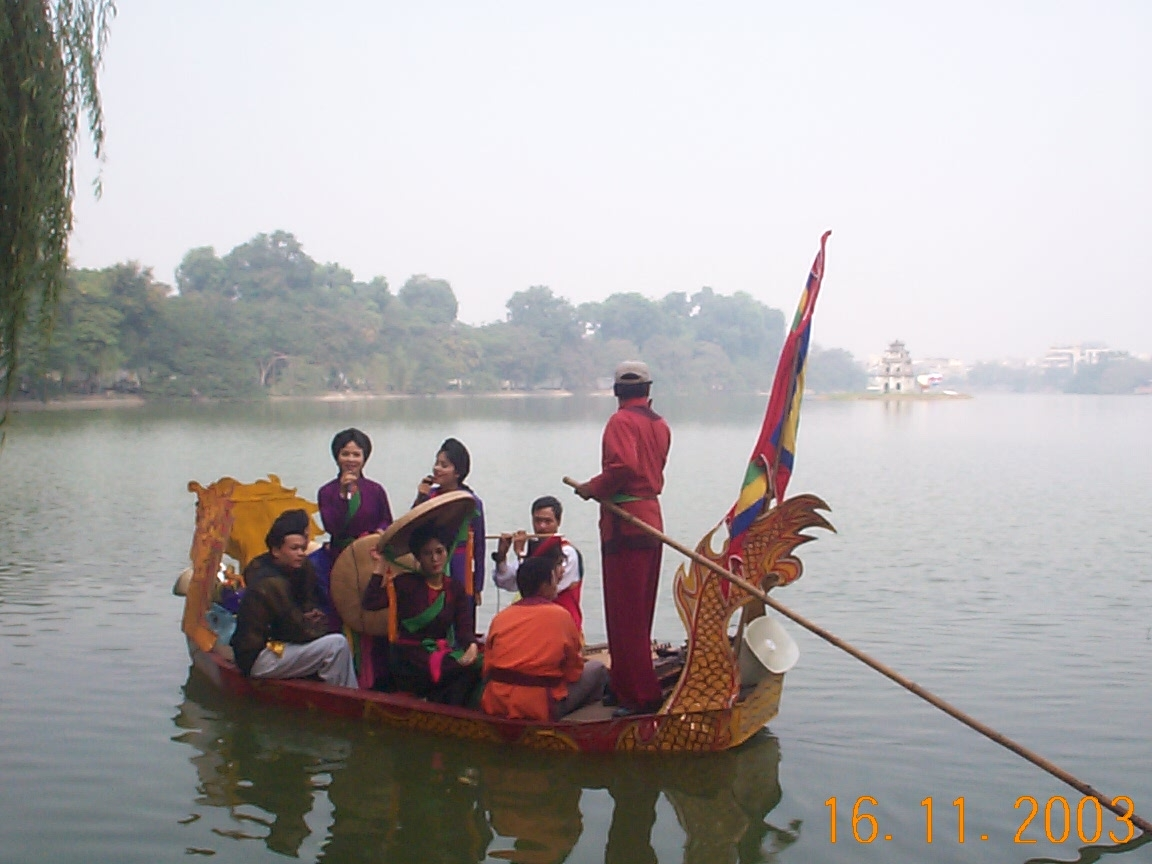 Hát Quan Họ Bắc Ninh trong một lễ hội du lịch tại Hà Nội. Licensing Thể loại:Bắc Ninh